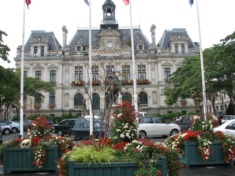 Hôtel de Ville de Vannes (56)